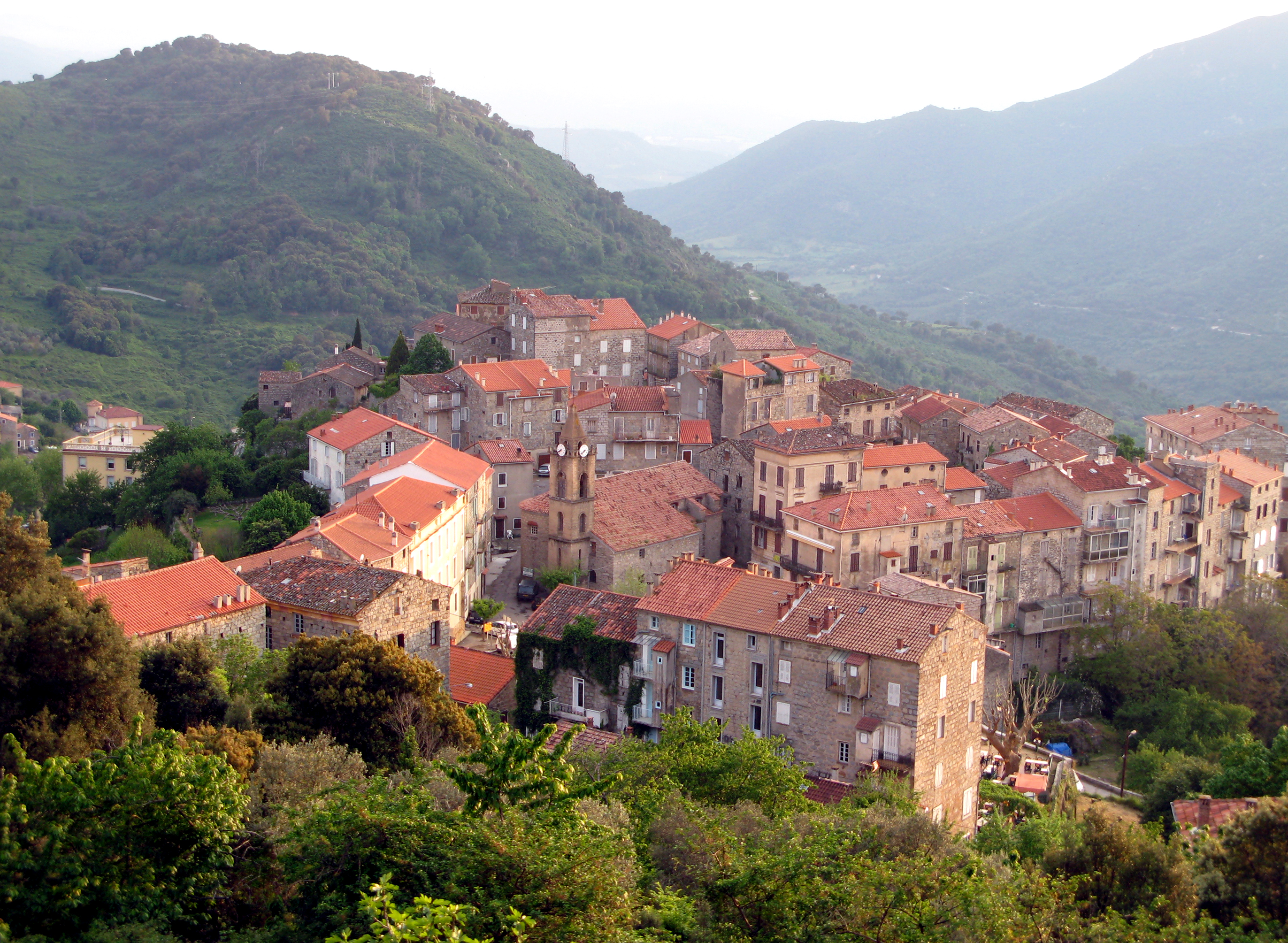 Ste-Lucie-de-Tallano (Corse-du-Sud, France)